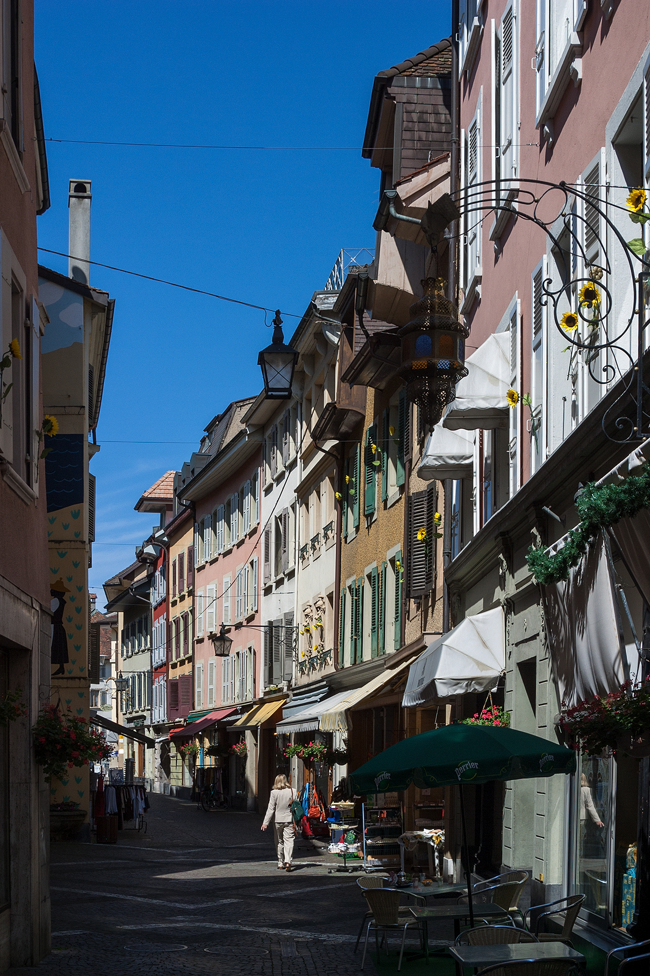 Bummel durch die Altstadt von Vevey